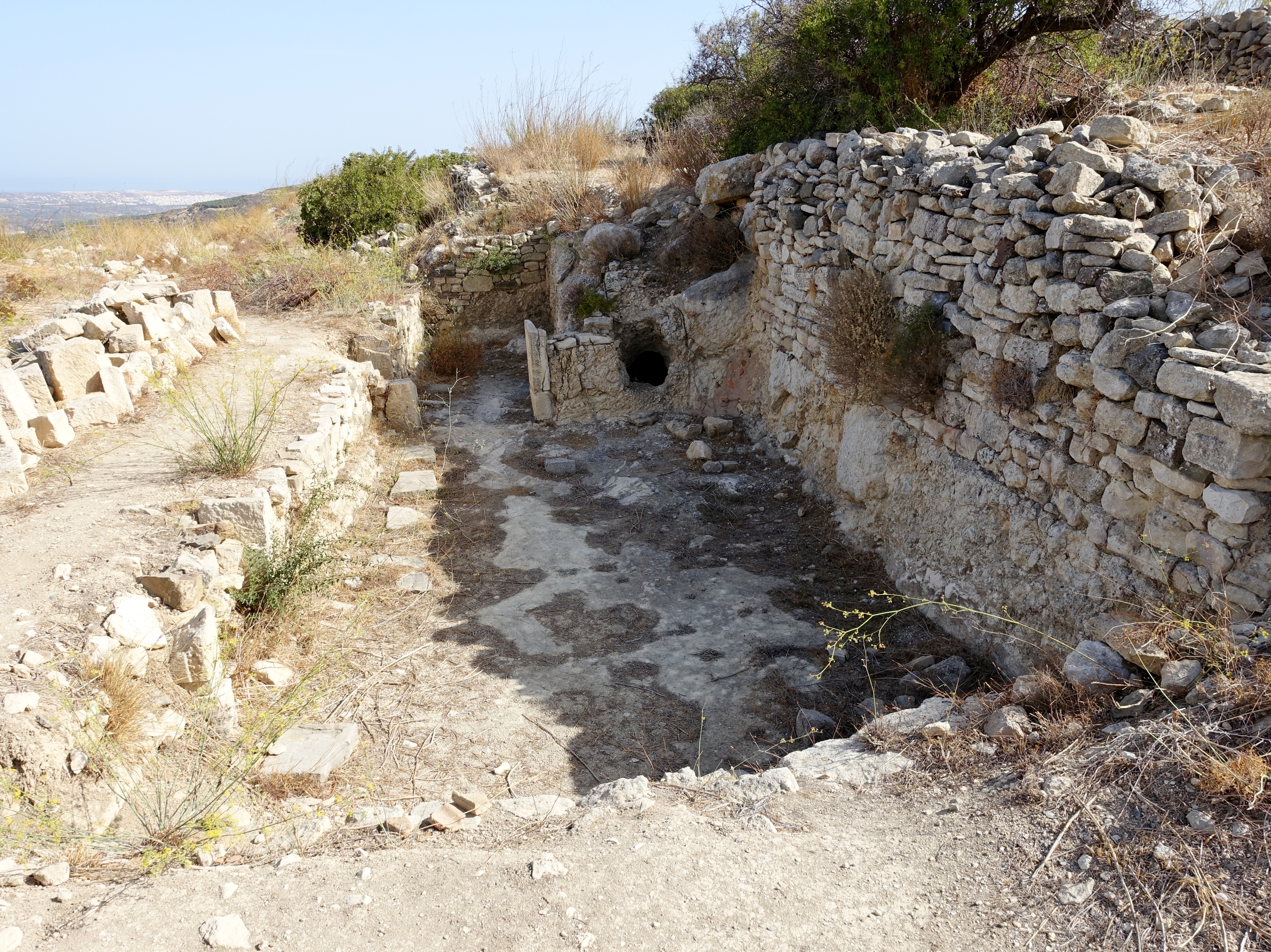 Erste Akropolis der Ausgrabungsstätte von Praisos (Πραισός), Gemeinde Sitia, Kreta, Griechenland